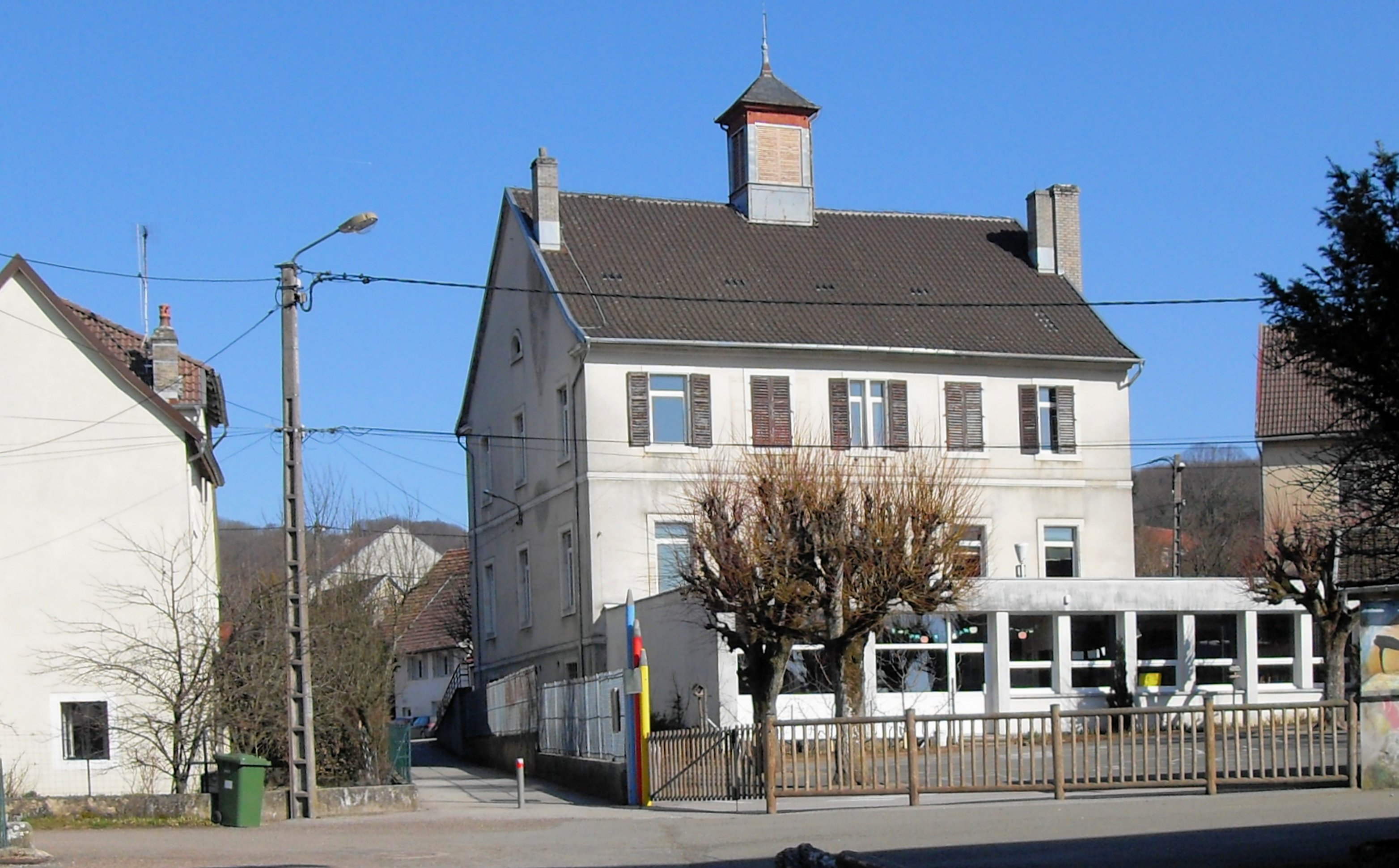 La mairie-école de Vandoncourt